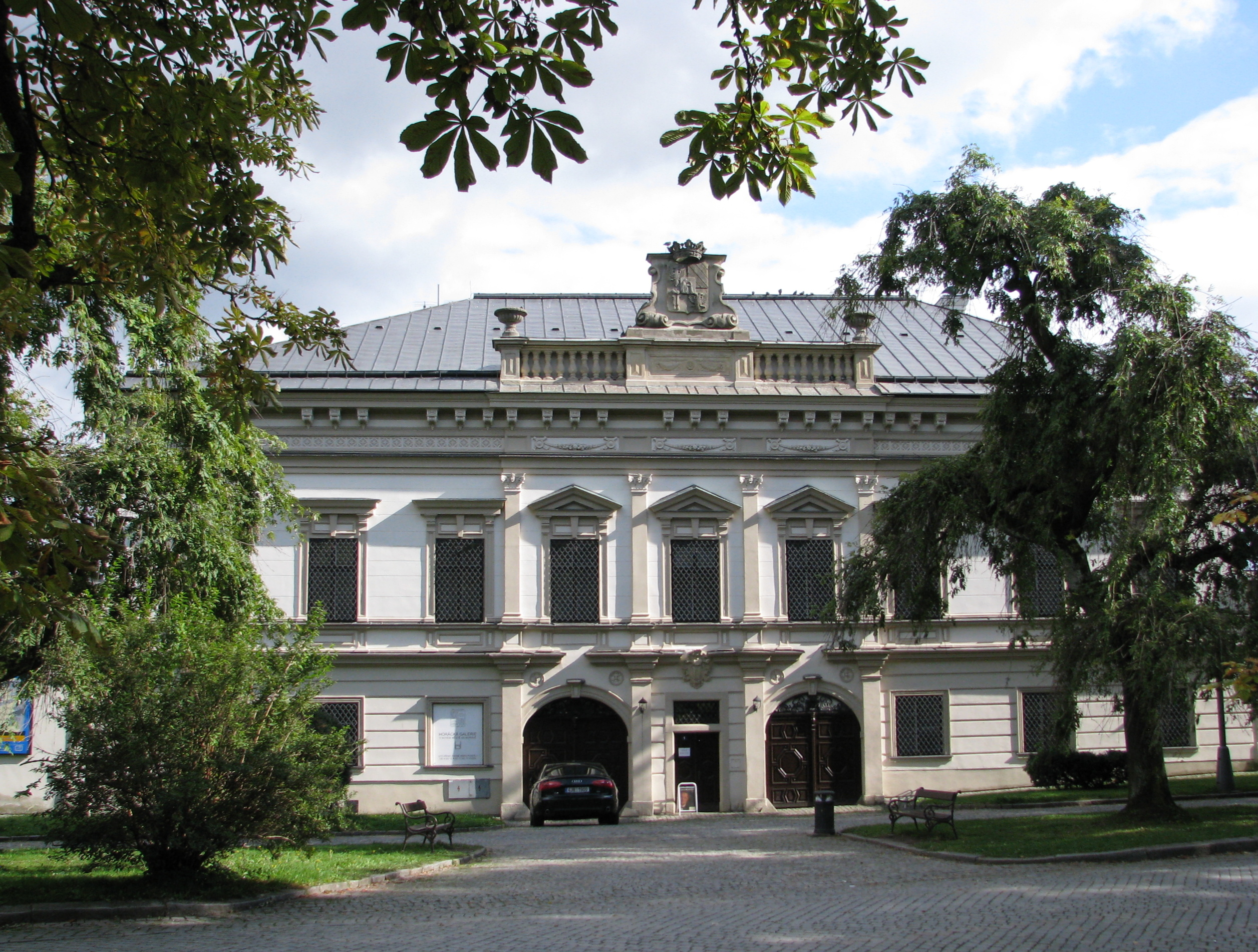 Zámek, Vratislavovo náměstí 1, Nové Město na Moravě